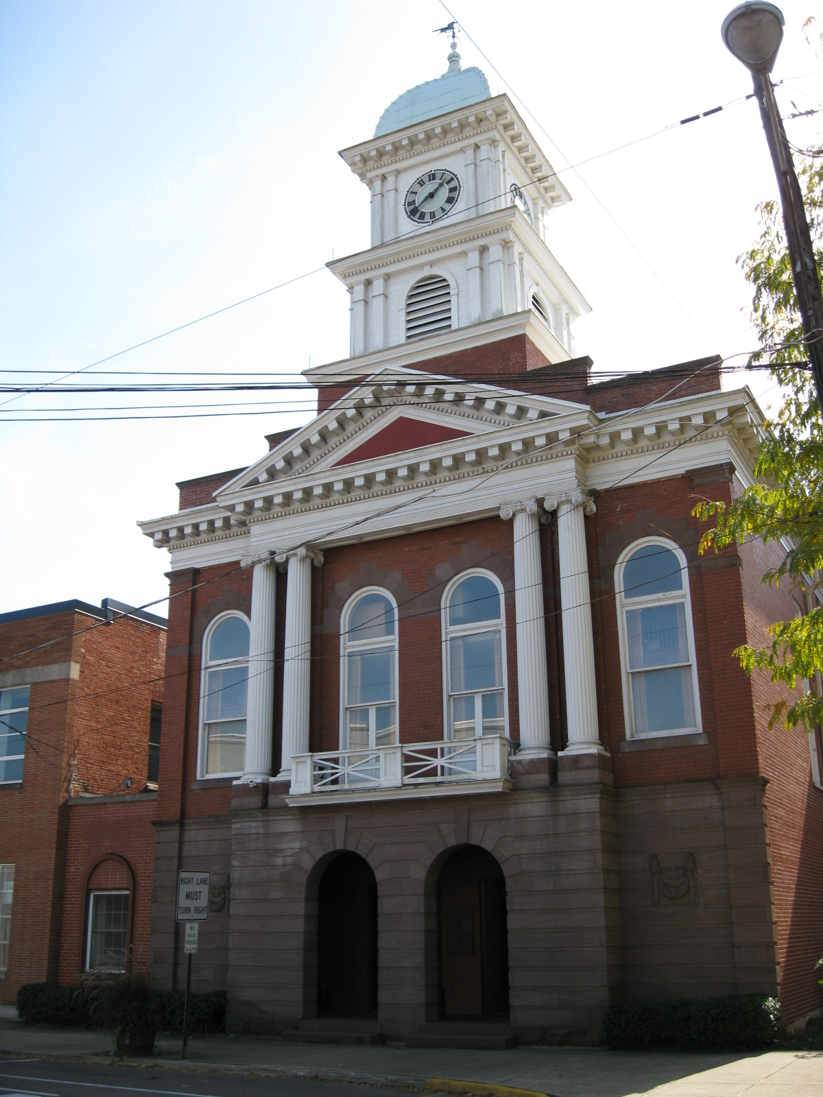 Middleburg, Pennsylvania